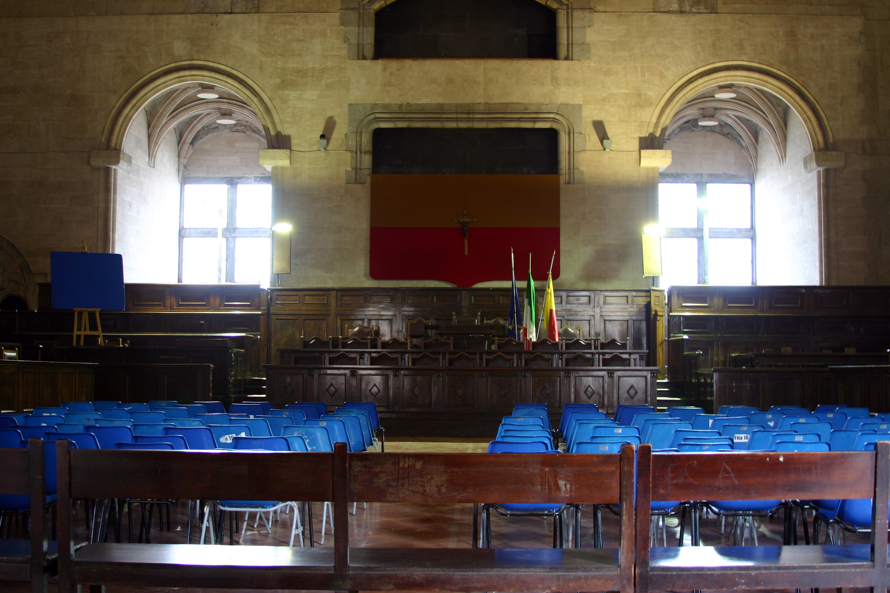 Castel Nuovo - Nápoles